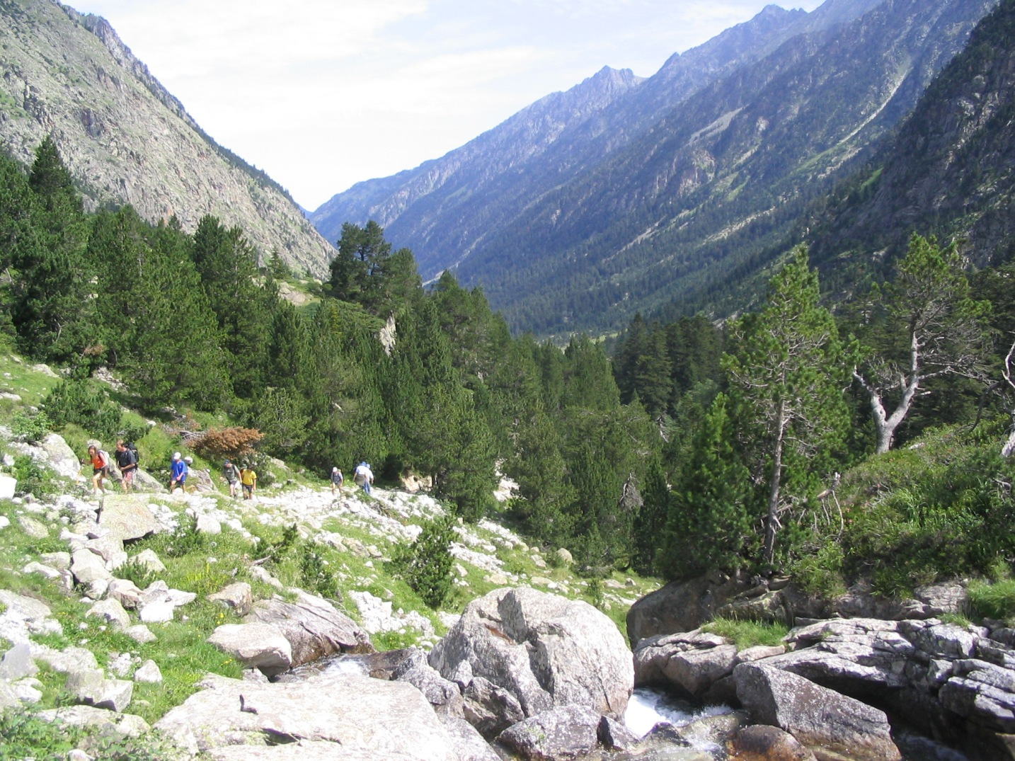 Valle de Estom, situado en los Pirineos franceses.